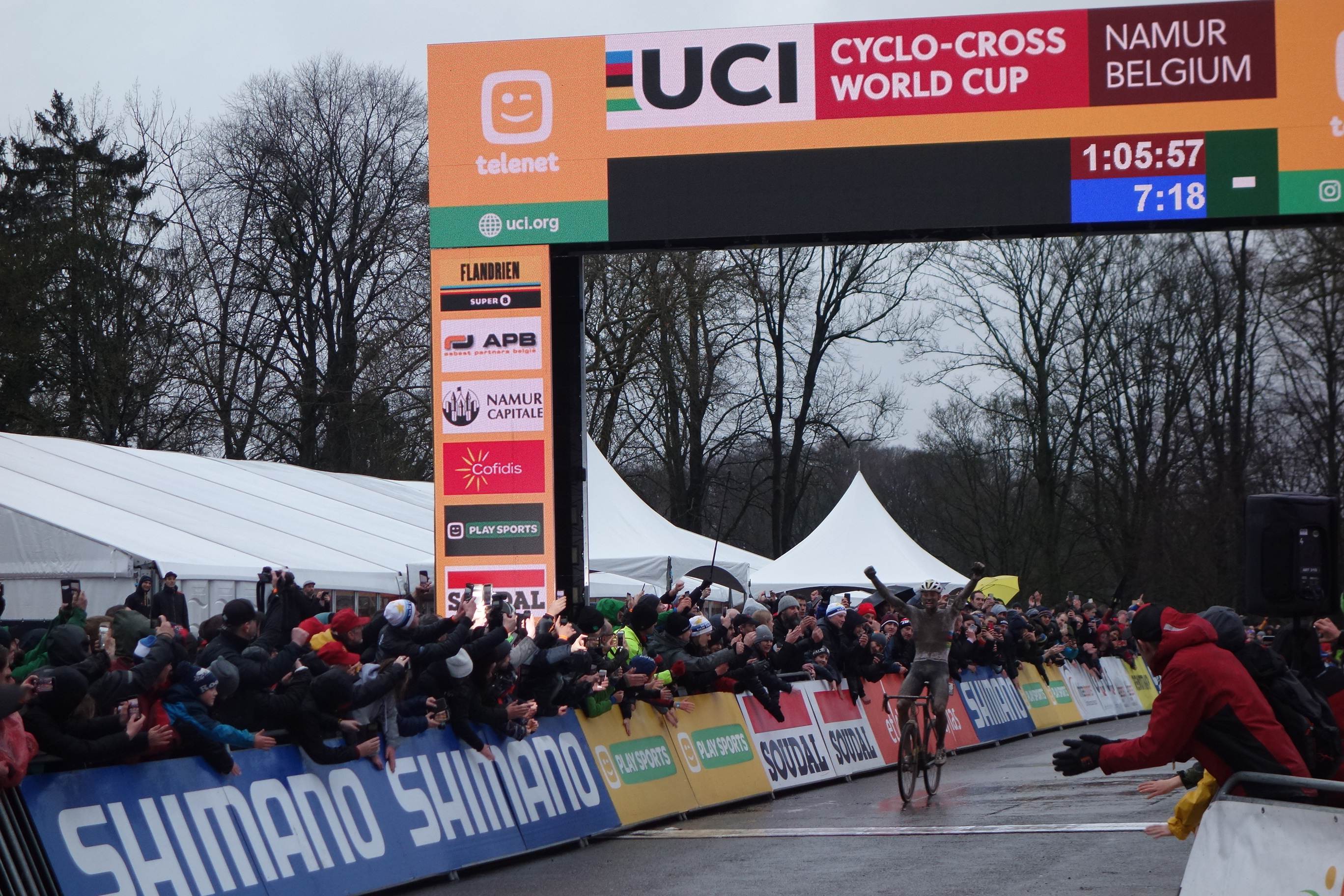 Wereldbeker veldrijden op de Citadel van Namen op zondag 22 december 2019